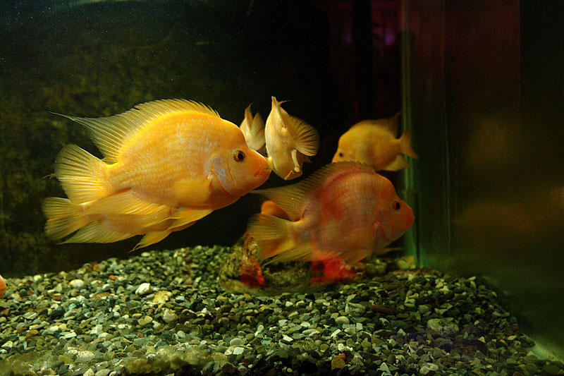 თბილისის ზოოპარკის აკვარიუმი.